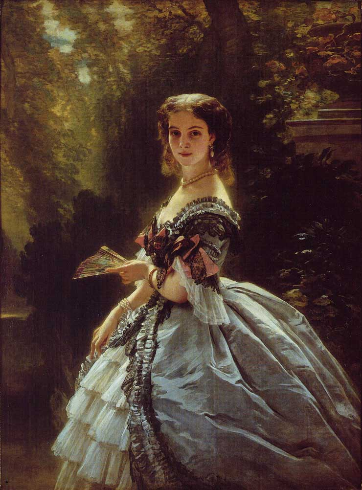 Elizabeth Trubetskaya (1832–1907)